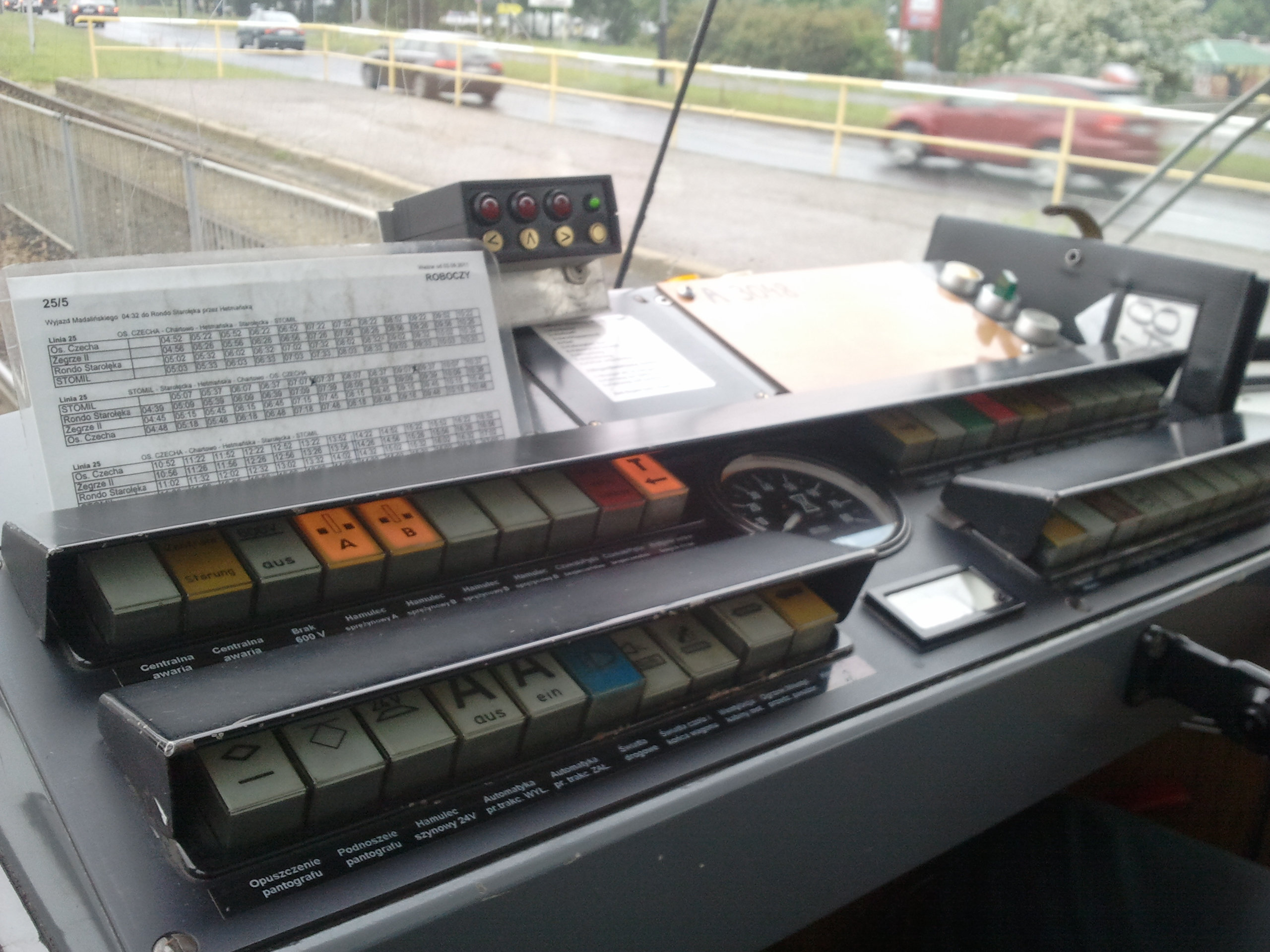 Pulpit wagonu #3048 podczas pobytu w Poznaniu i obsługi linii 25.